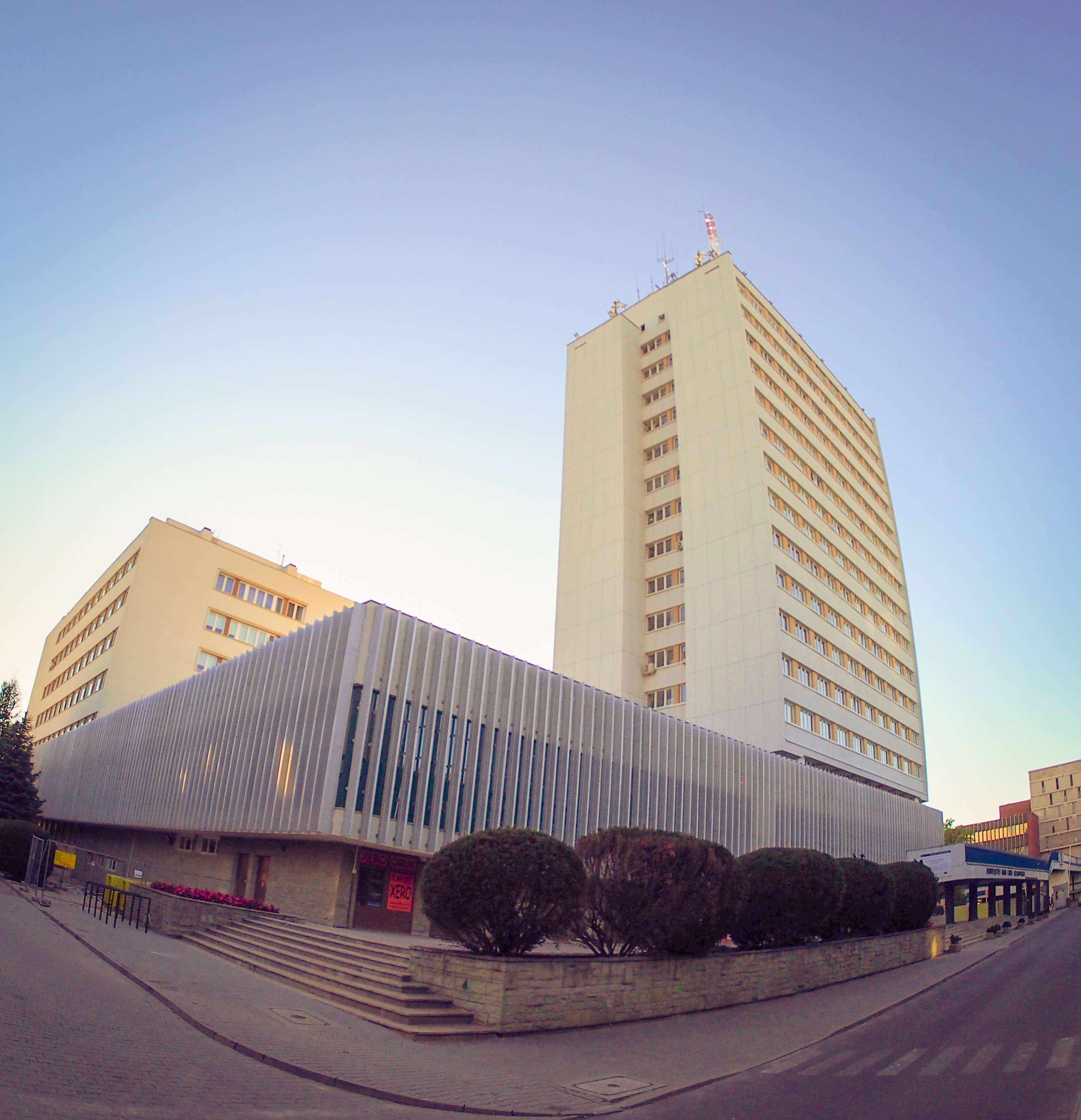 Zdjęcie przedstawia budynek Rektoratu UMCS, Wydziału Ekonomicznego oraz Wydziału Prawa i Administracji